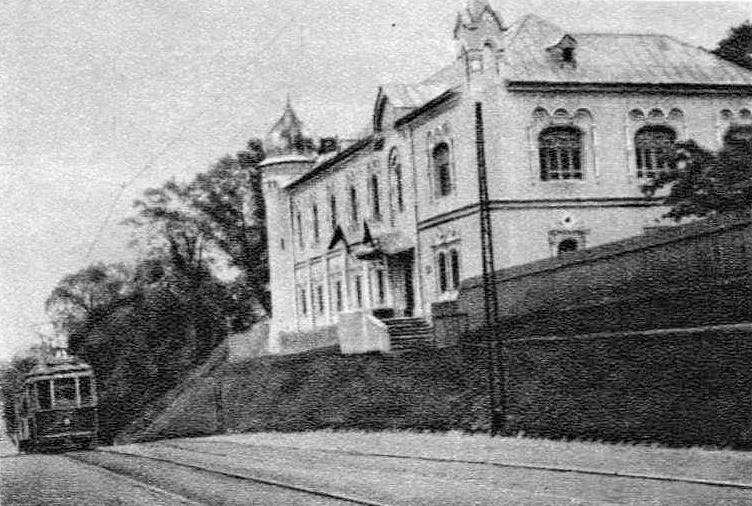 Беларуская (тарашкевіца): Менск (Miensk), Новае Места (Novaje Miesta). Беларускі дзяржаўны музэй у будынку колішняга Архірэйскага падвор’я (Archirejskaje padvorje)